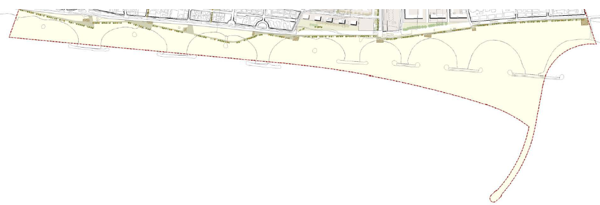 Proyecto de reforma de las playas de Cunit (Tarragona) Projecte de reforma de les platges de Cunit (Tarragona)